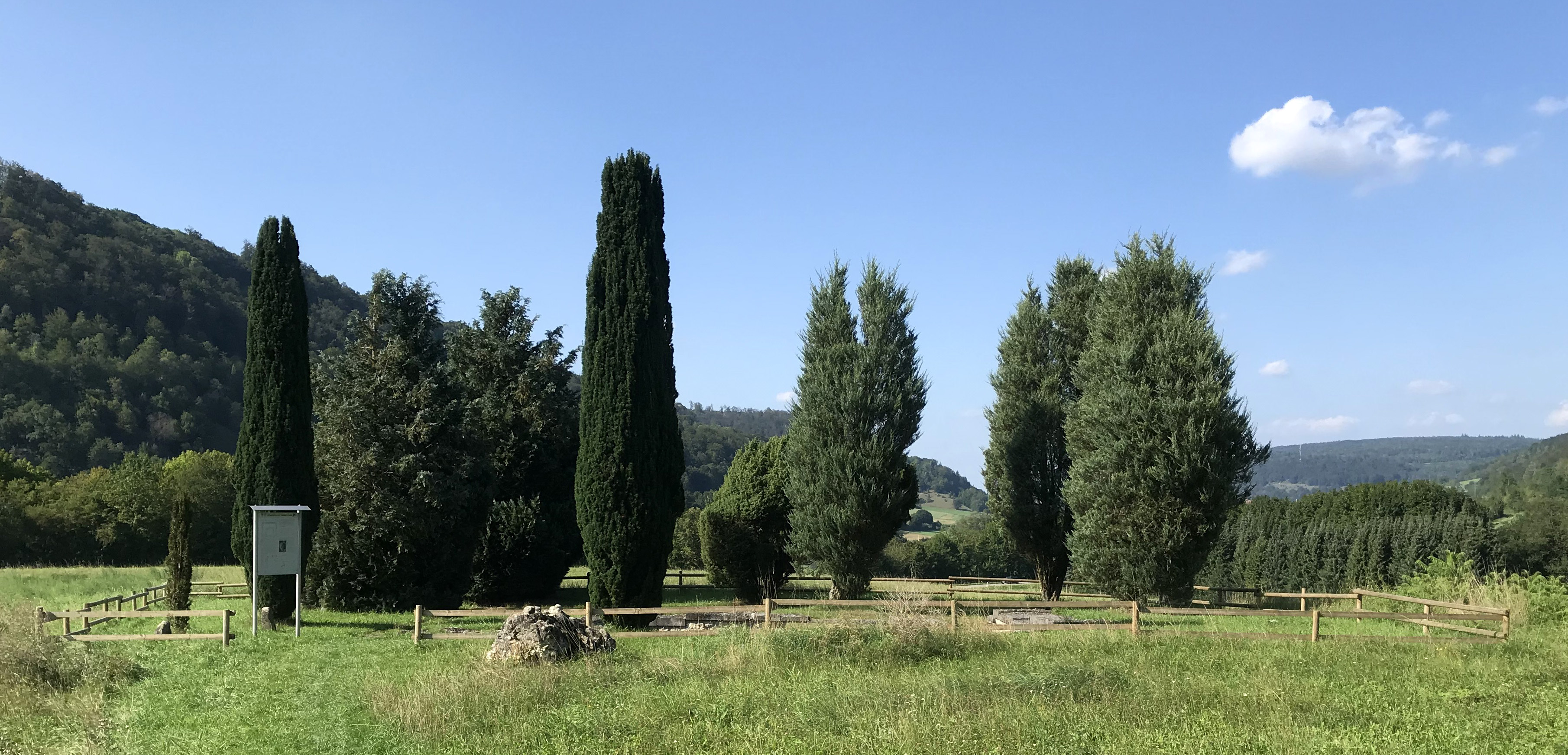 Oberkochen - Im Jahre 1971 ausgegrabener römischer Keller, wahrscheinlich Teil einer Raststätte an der römischen Straße durch das Brenz-Kocher-Tal aus dem 2./3. Jahrhundert n. Chr.